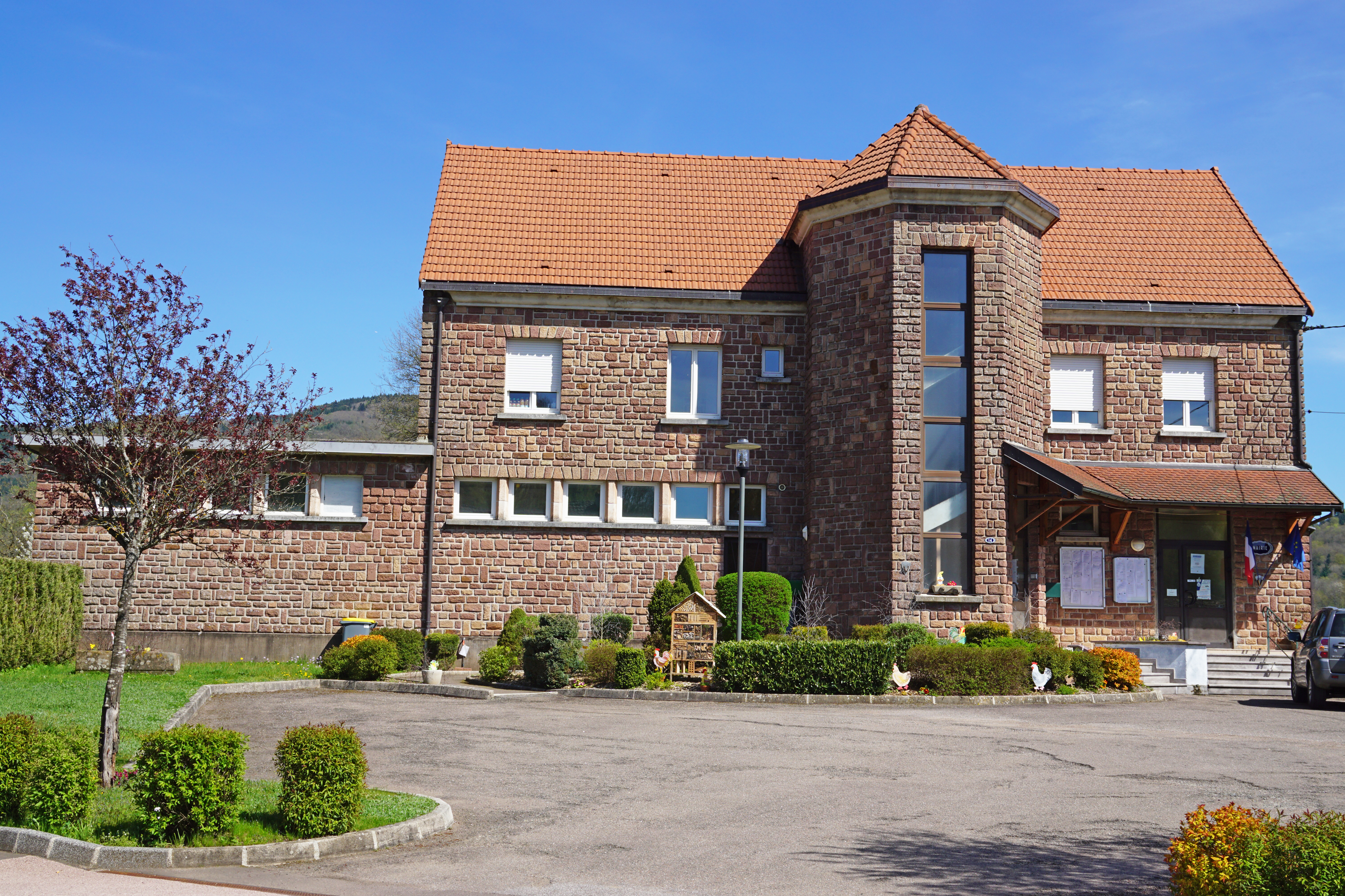 La mairie de Belonchamp.